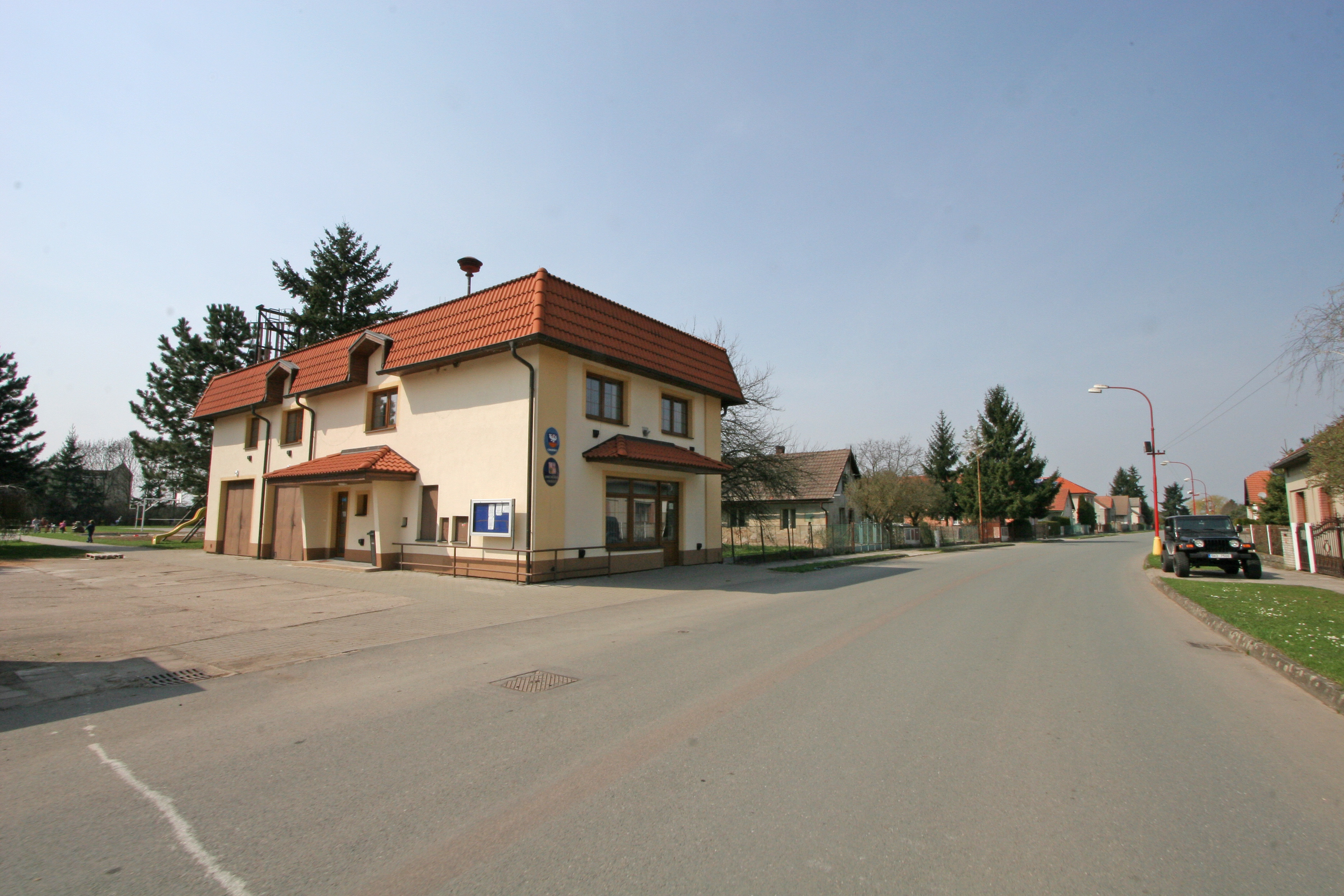 Chudeřice obecní úřad